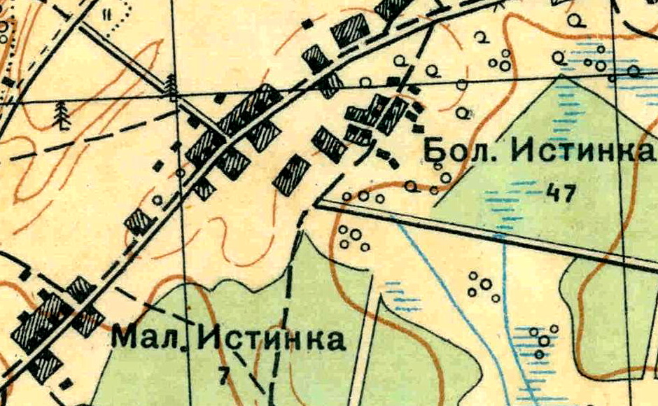 Топографическая карта Ленинградской области, квадрат О-36-13-А-а (Большая Пудость), деревня Истинка